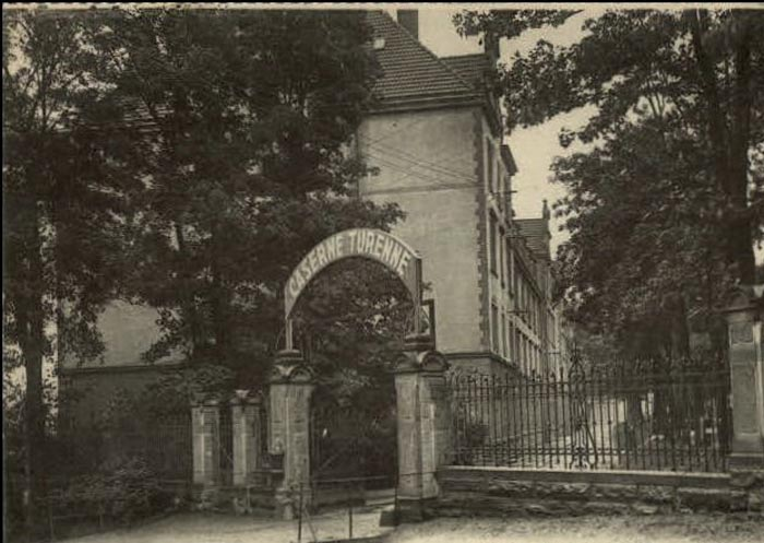 Erbgroßherzog Friedrich Kaserne in Koblenz (zeitweilig Caserne Turenne)